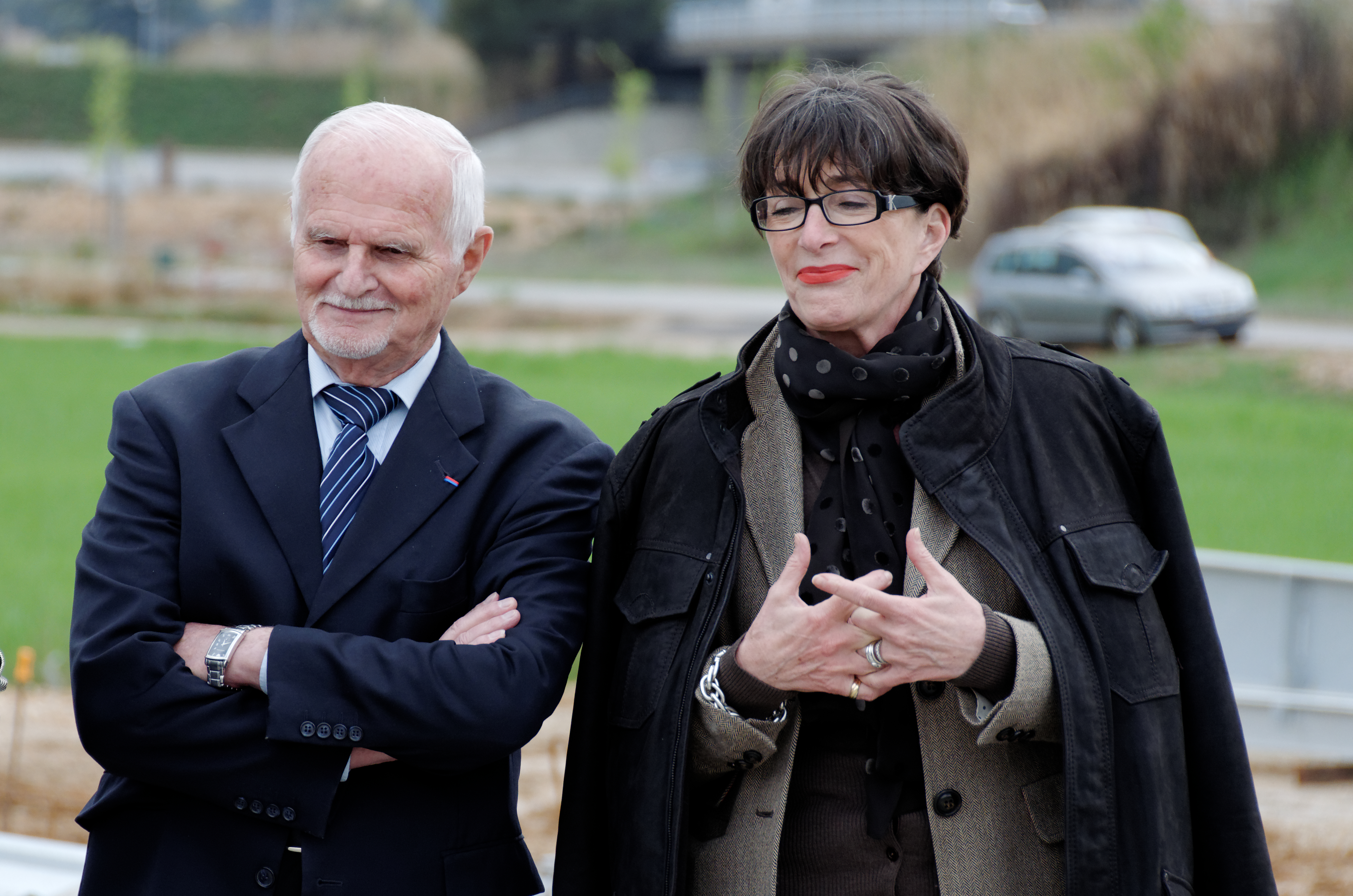 Josette Pons (députée de la sixième circonscription du Var, France) et Horace Lanfranchi (Président du conseil général du Var)